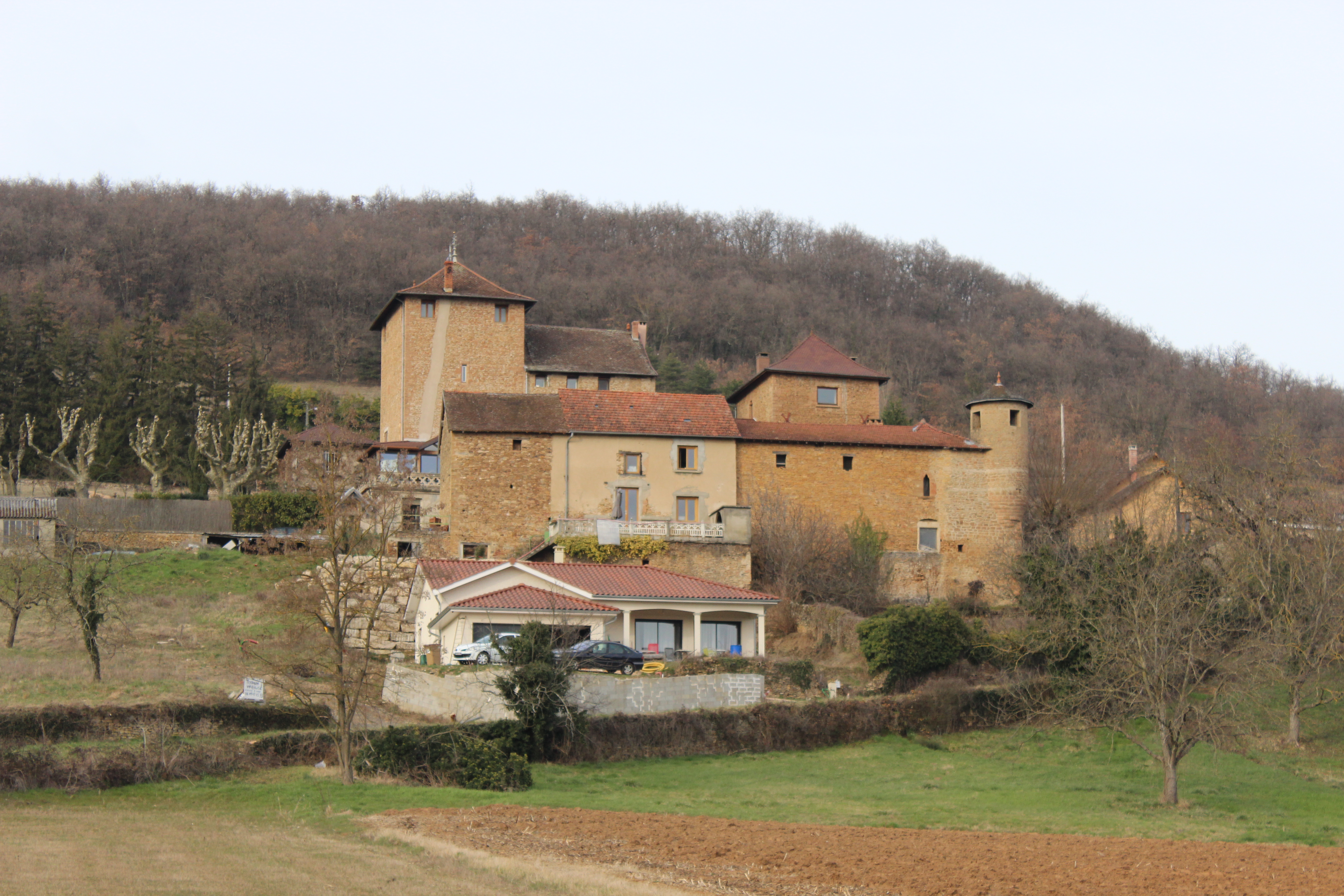 Panossas - Château d'Antouillet.